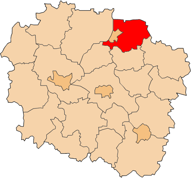 Powiat grudziądzki na mapie województwa kujawsko-pomorskiego.